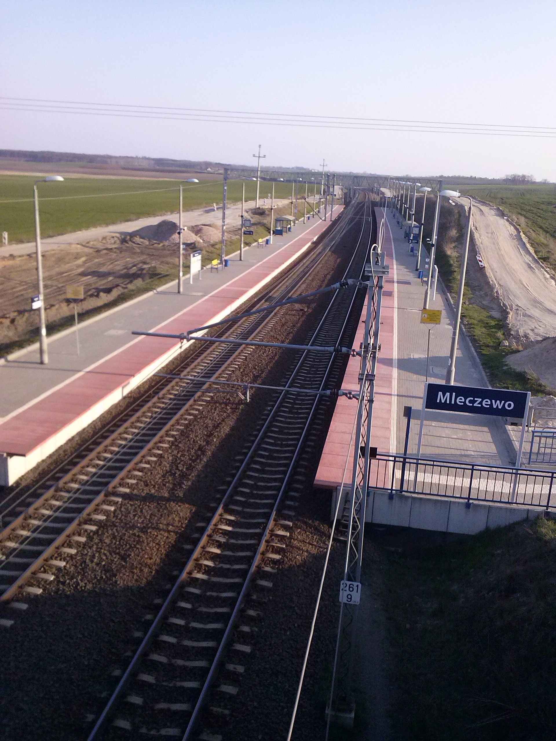 Nowy peron stacji kolejowej w Mleczewie